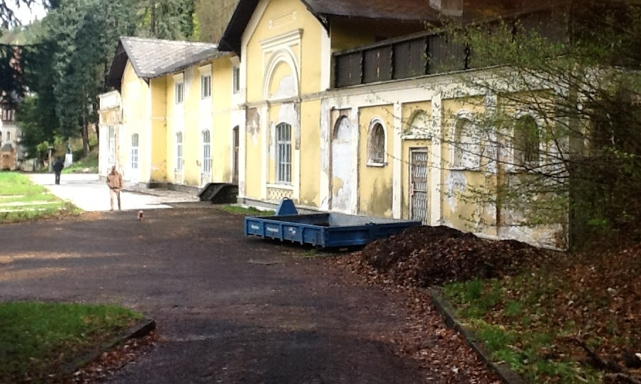 Kavárna Kyselka 2014